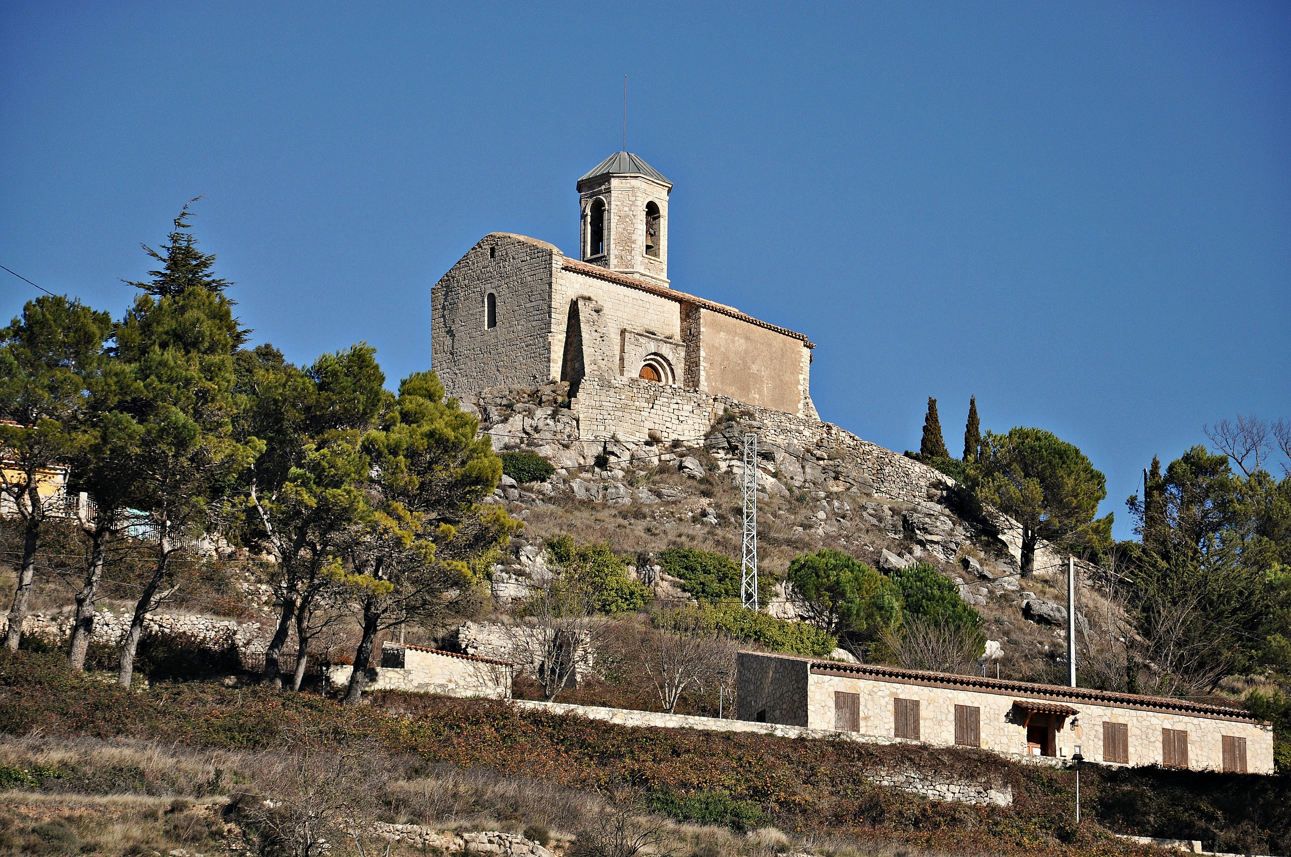 alt camp-tarragona-cataluña